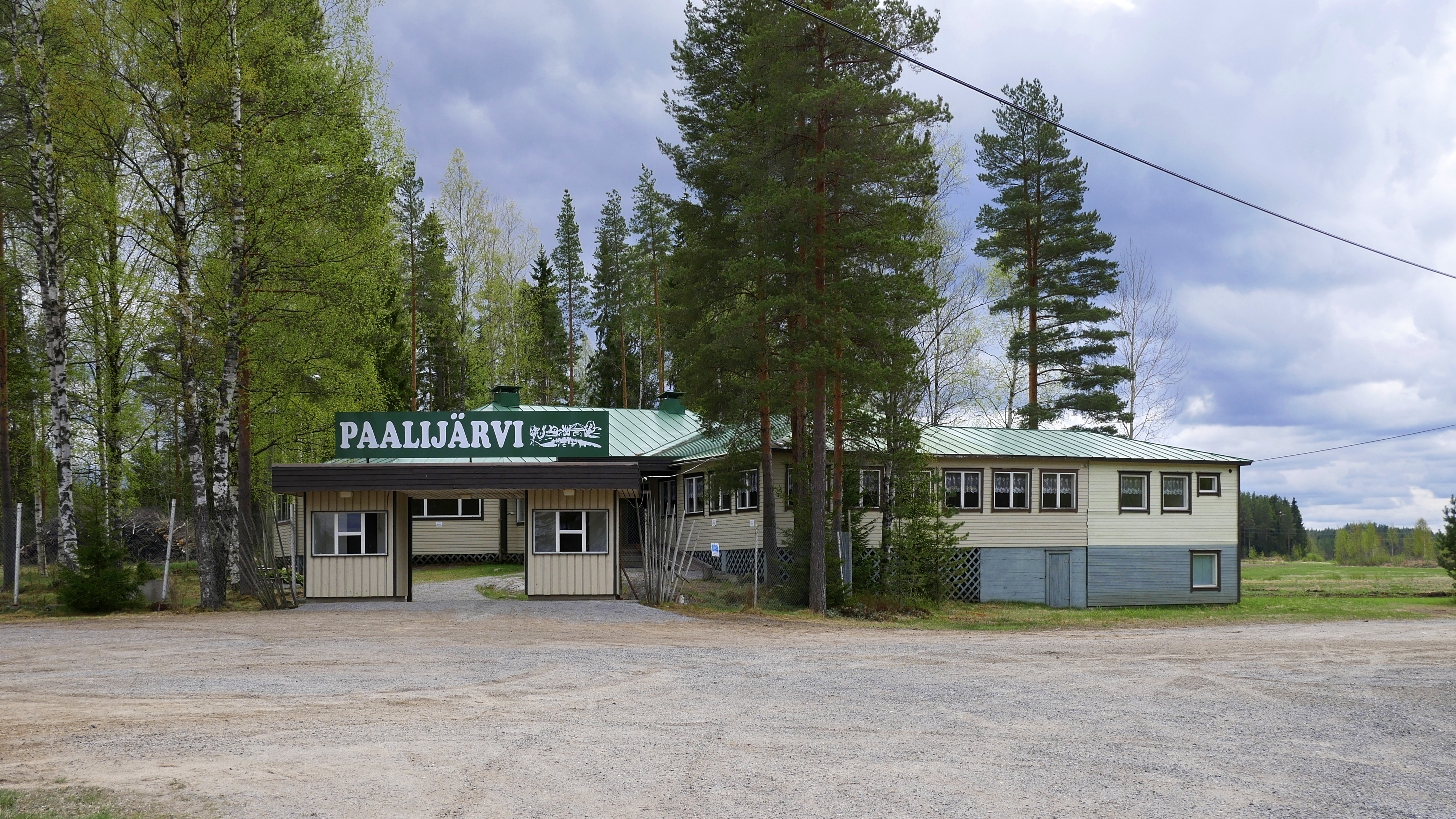 Paalijärven tanssilava Alajärvellä.